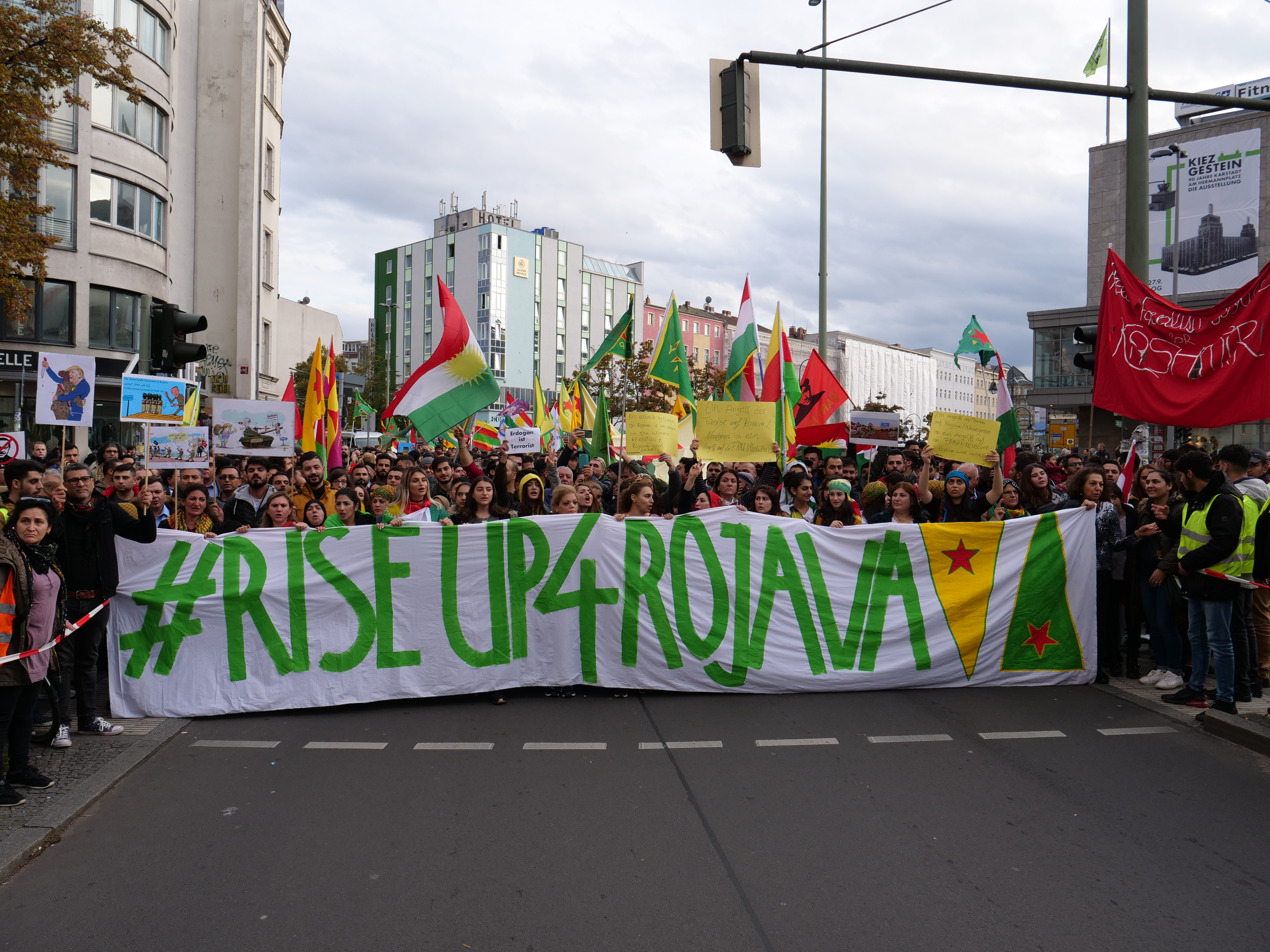 Rojava Block auf der Anticolonial March Demonstration am 12. Oktober 2019 in Berlin.